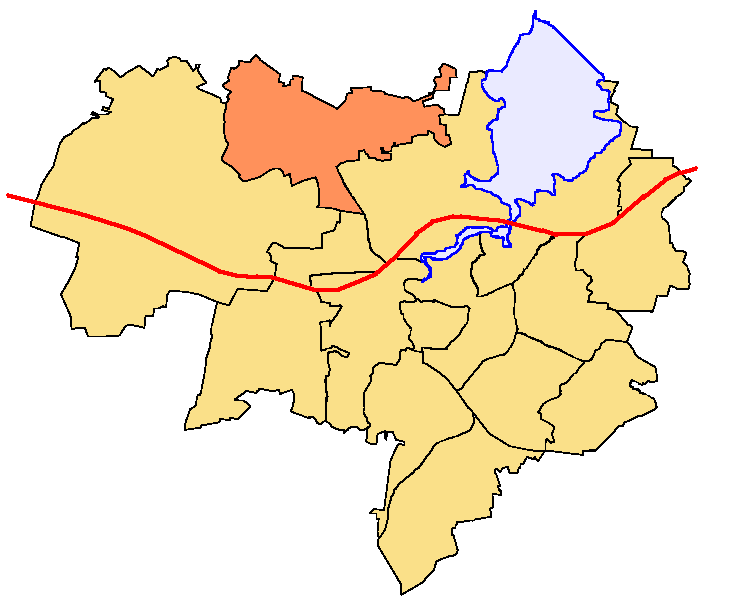 Map of Bautzen, Kleinwelka is highlighted in orange.